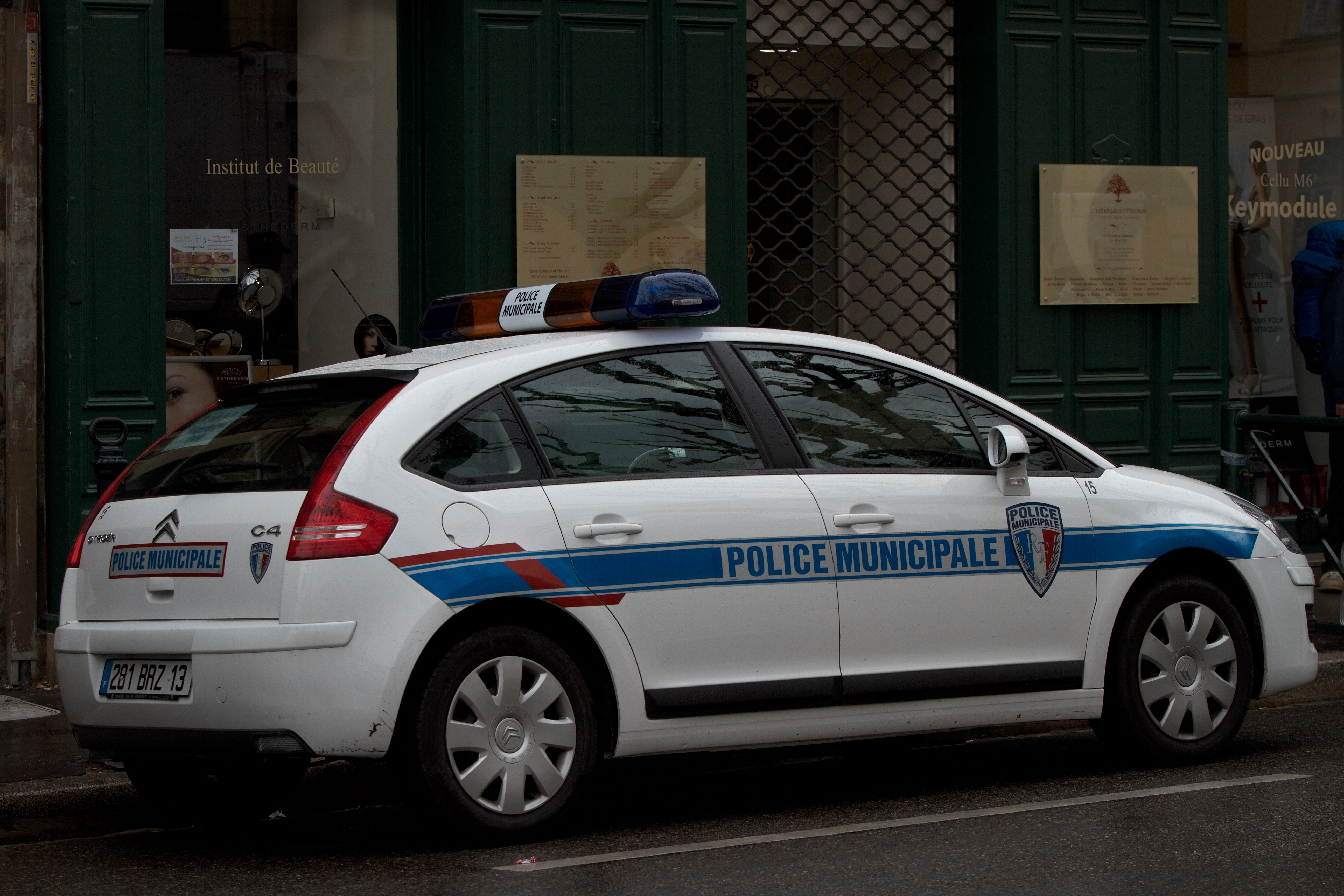 Citroën C4 de la police municipale d'Aix-en-Provence (France).